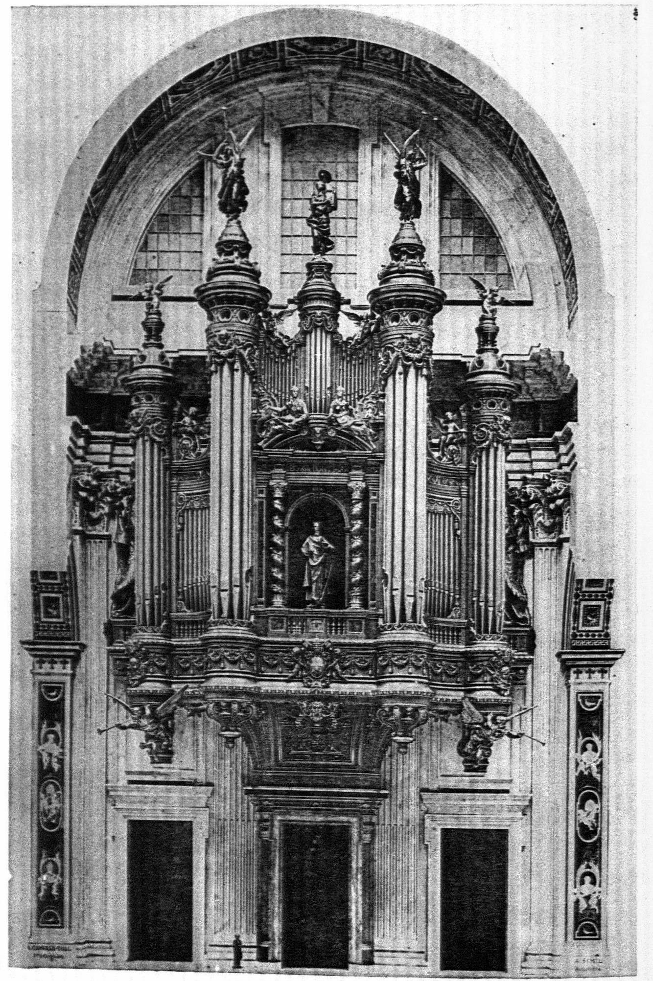 Projet d'Orgue Monumental pour Saint-Pierre de Rome. Modèle offerte à Léon XIII 1888